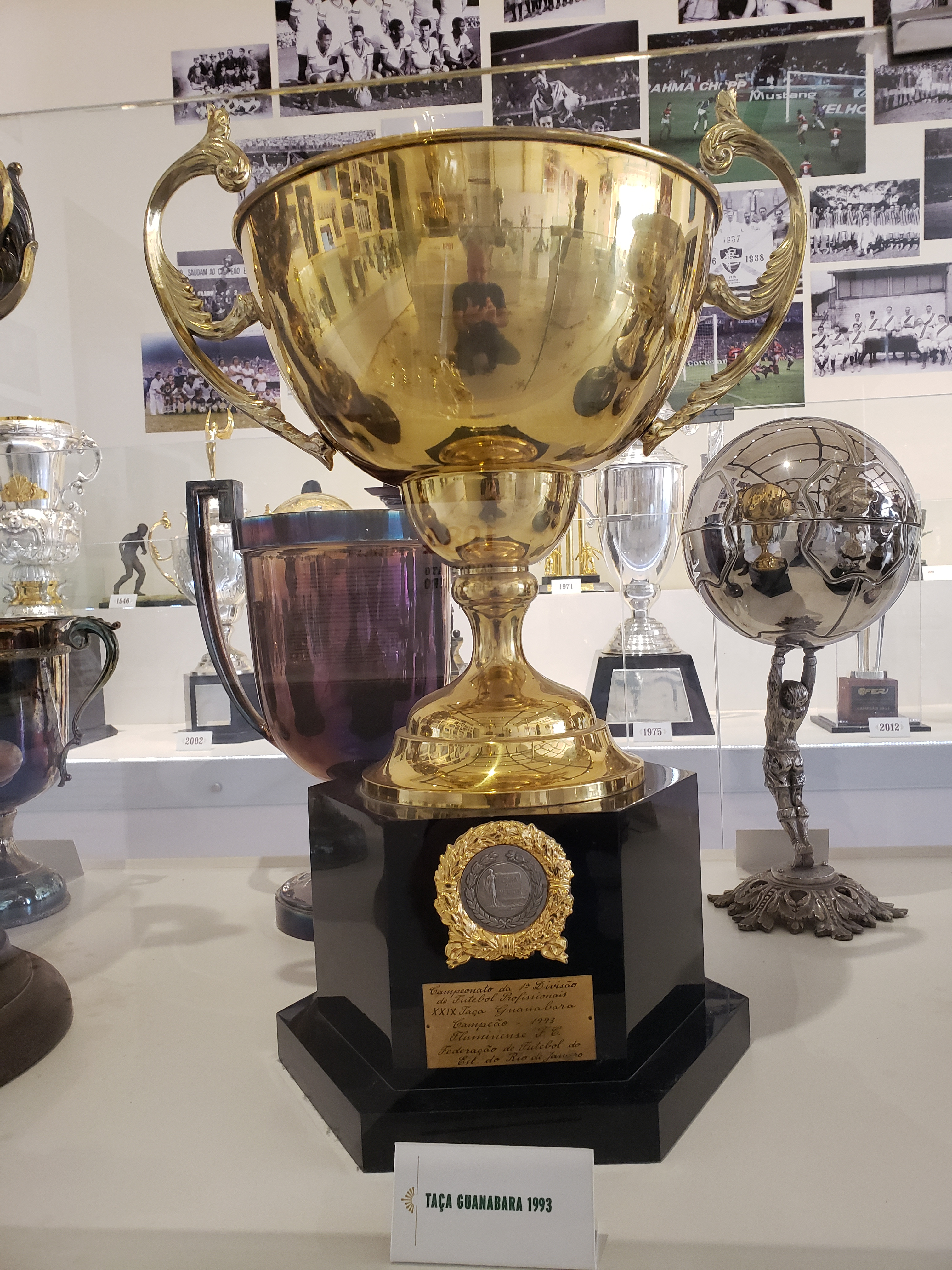 Taça Guanabara de 1993, conquistada pelo Fluminense Football Club.